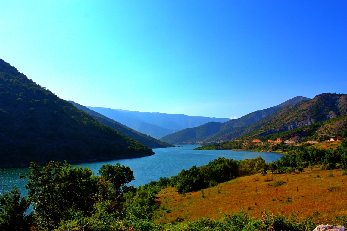 Езерото (язовир) Козяр, Република Македония.